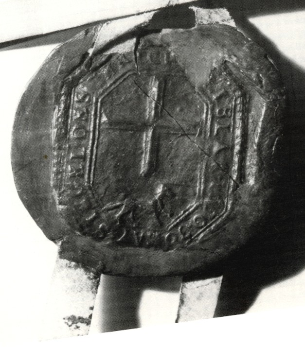 Siegel des Gerichtes Liblar